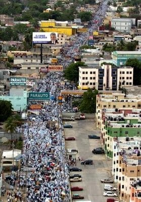 Marcha de Miguel de PRD para presindencia en Santo Domingo Oeste